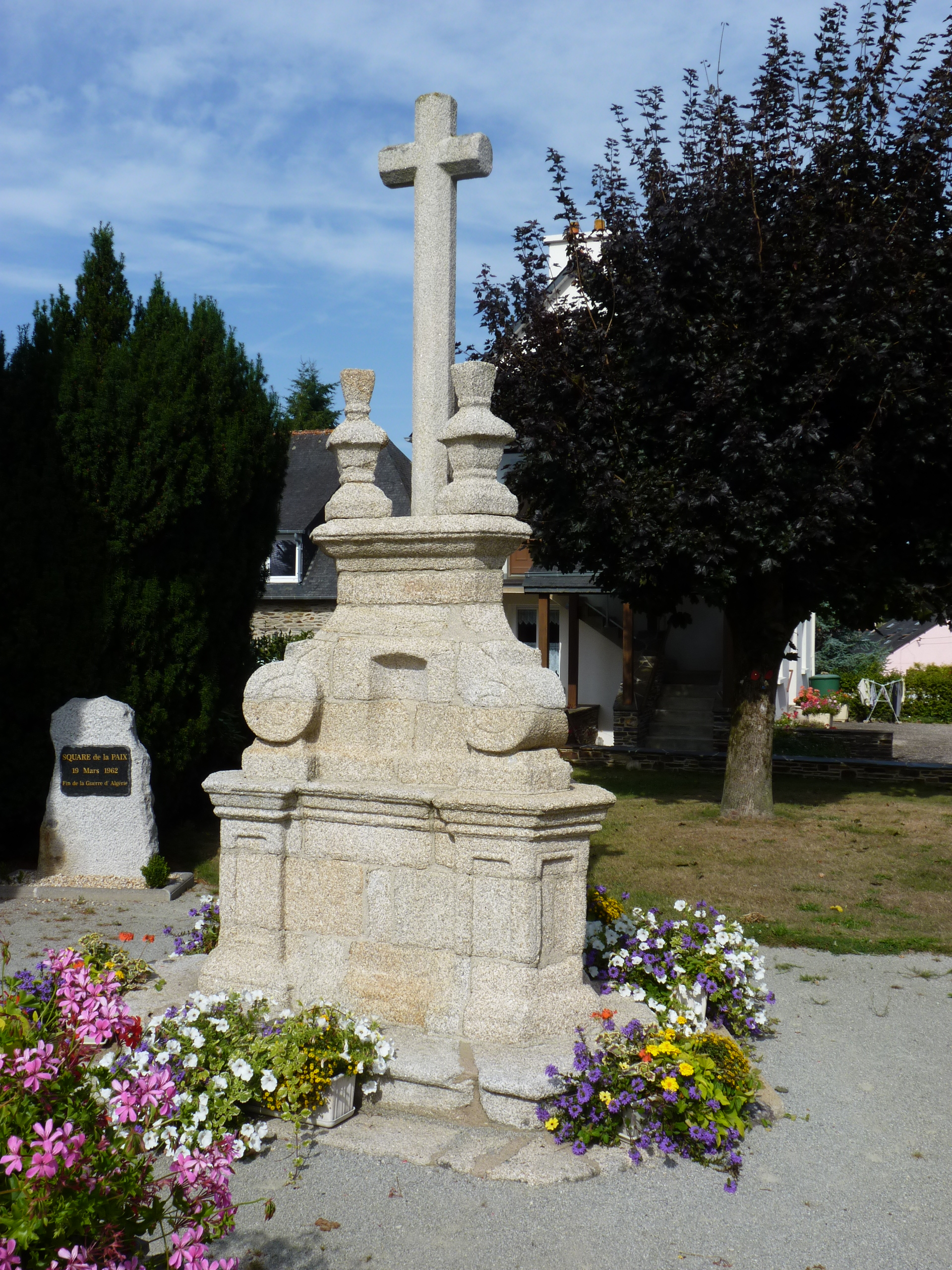 Croix de cimetière du 18ème siècle